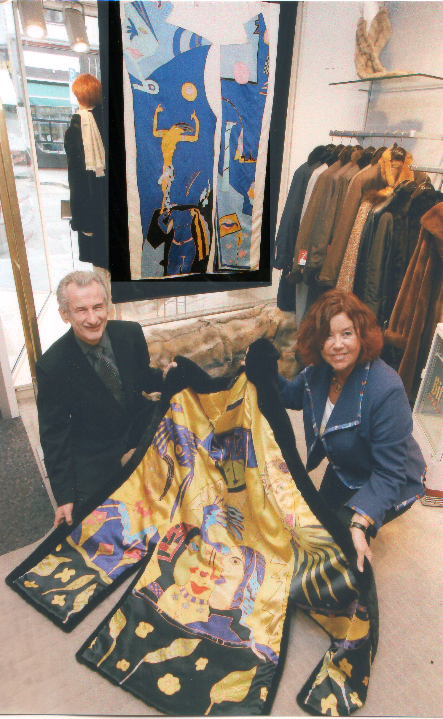 Handbemalte Seide in einem Nerzmantel. Rechts die Künstlerin Johanna E. Luerweg, Oberhausen.